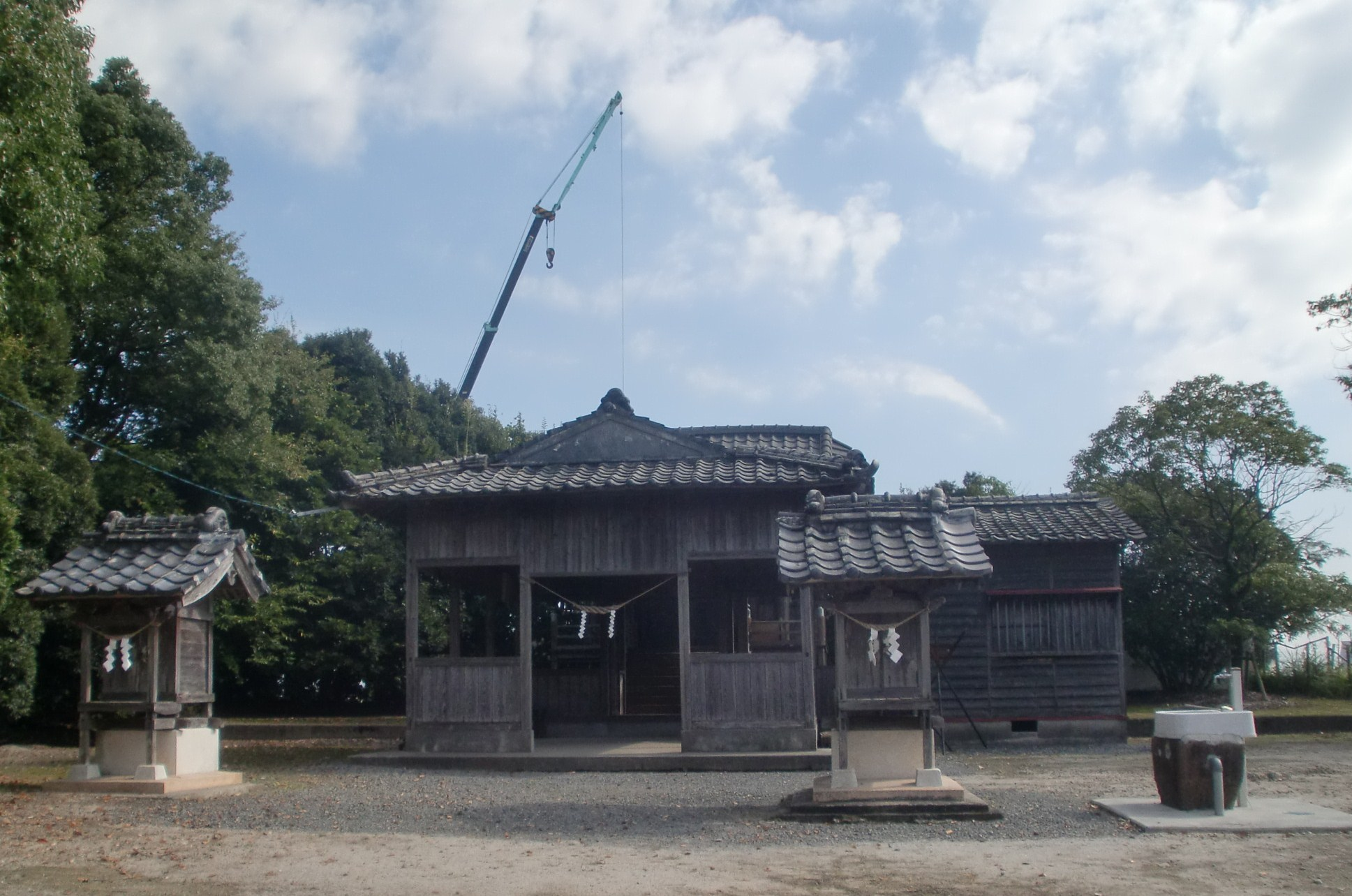 伊佐智佐神社の外観。